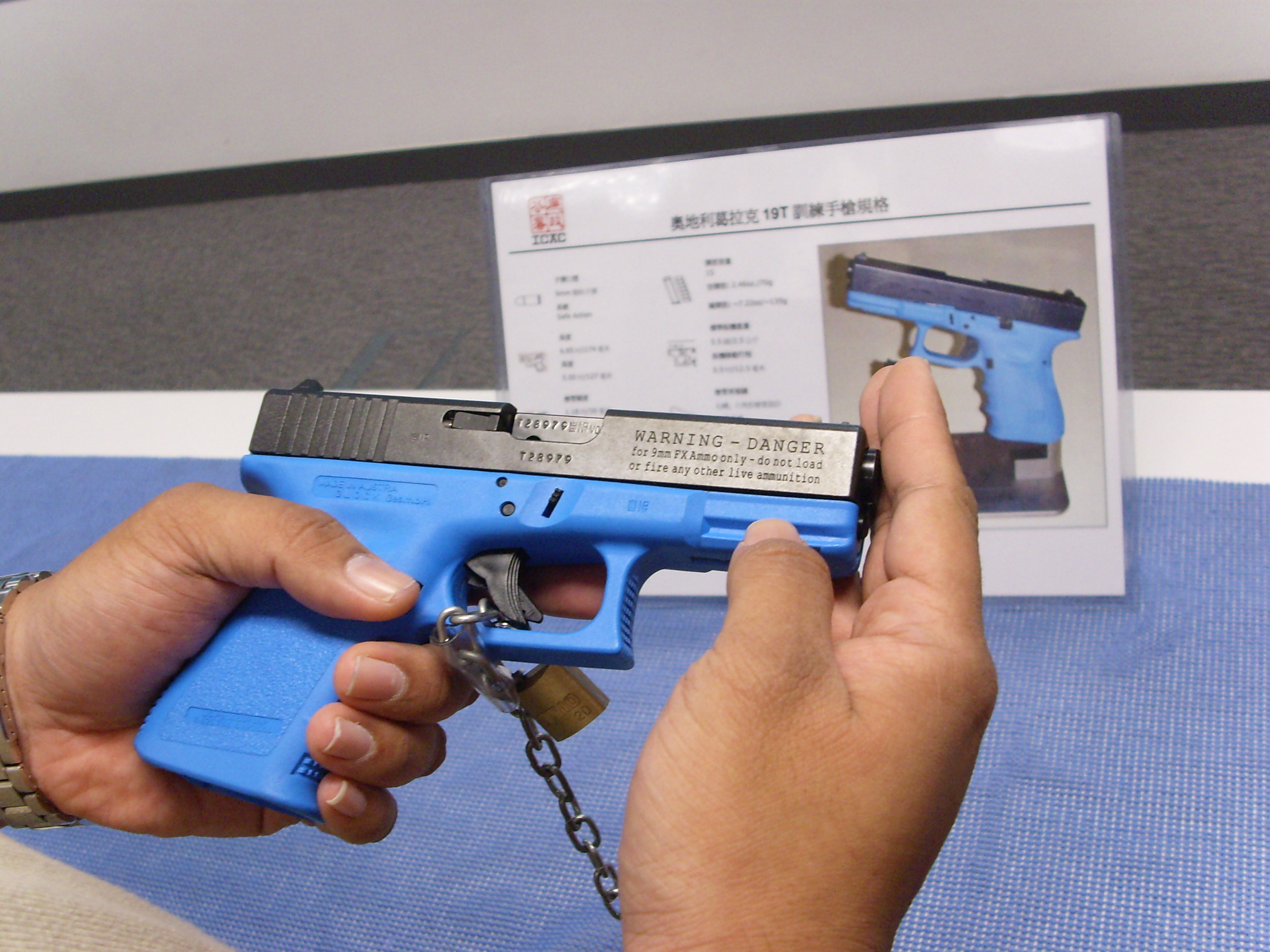 中文（香港）: 葛拉克19T訓練手槍，攝於2009年香港zh:廉政公署總部開放日